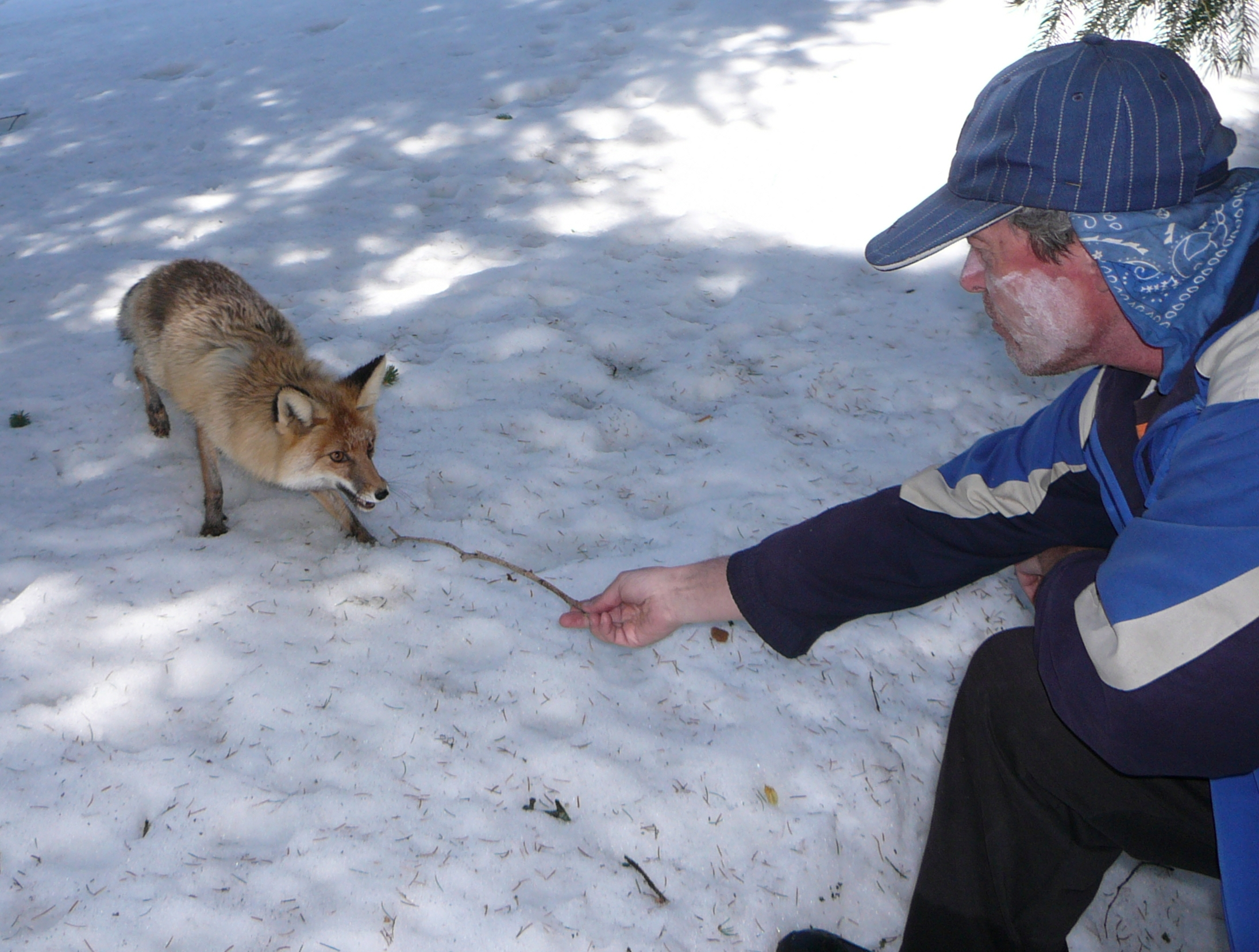 Лисица, прикормленная туристами, требует еду. Снято в ущелье Туюк-Су на 2 километра выше горнолыжного комплекса "Чимбулак", в 20 километрах от города Алма-Аты. Видеоролик с кормлением лисицы на